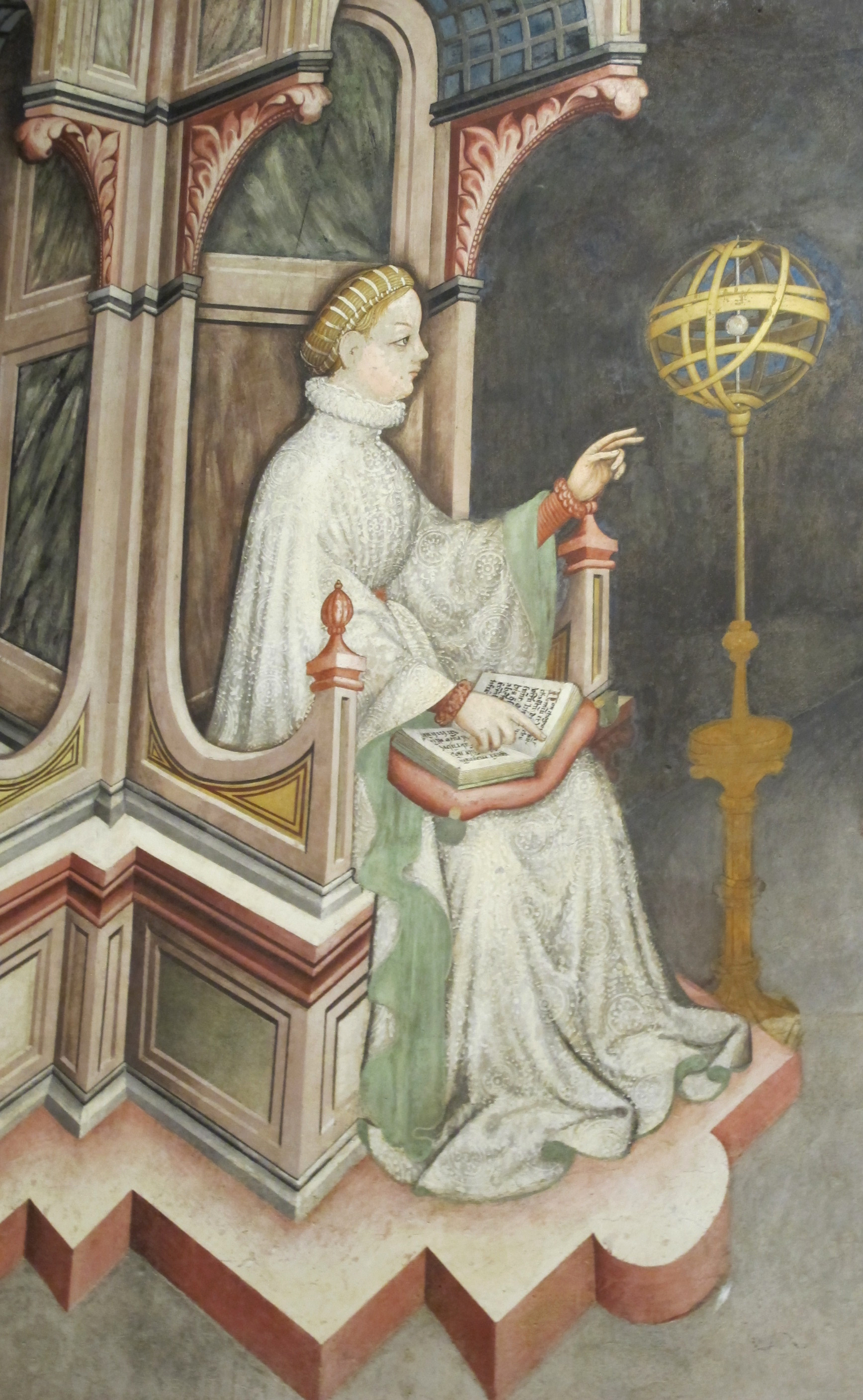 Sala delle arti liberali e dei pianeti 13.1 astronomia